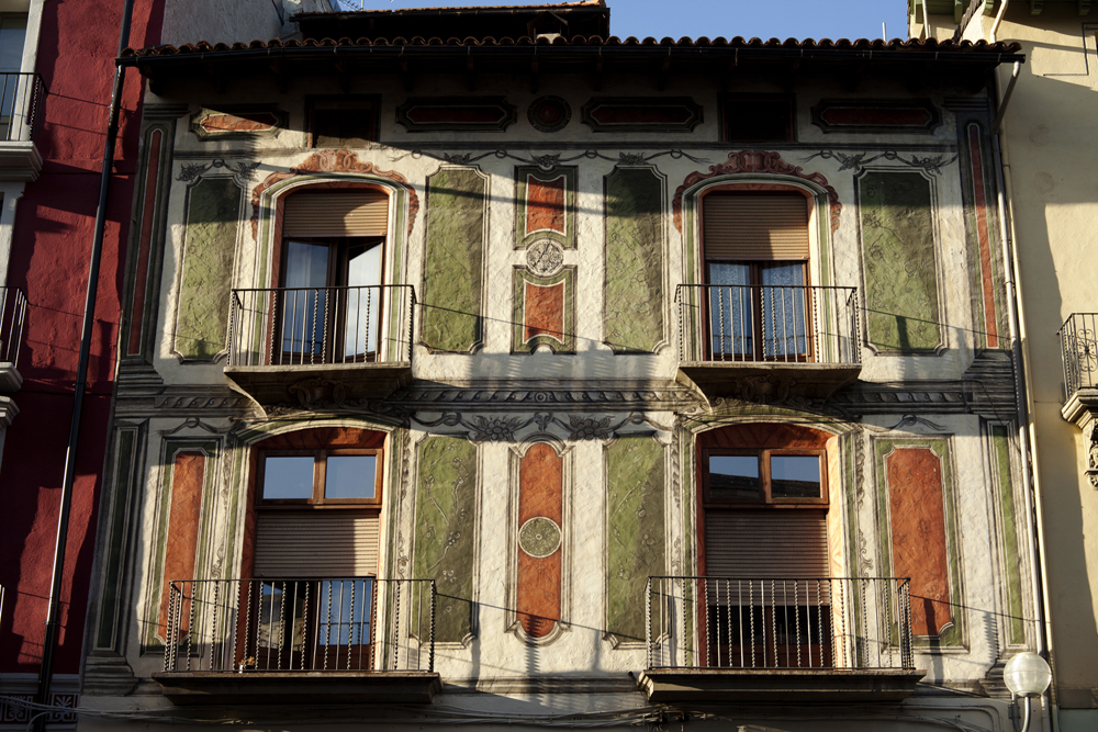 Can Fiter, 6 Major straat (La Seu d'Urgell)